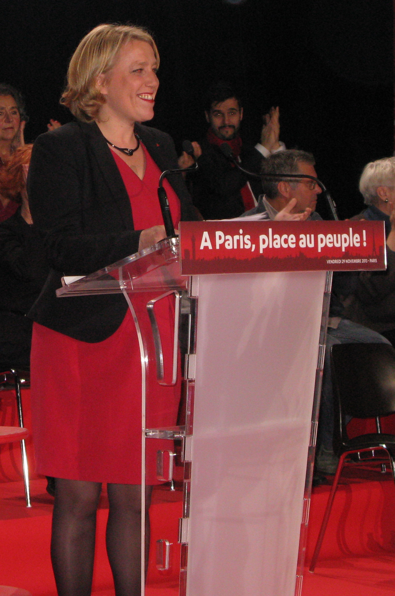 Danielle Simonnet à Paris, lors du lancement de la campagne des municipales 2014 du Front de gauche parisien.